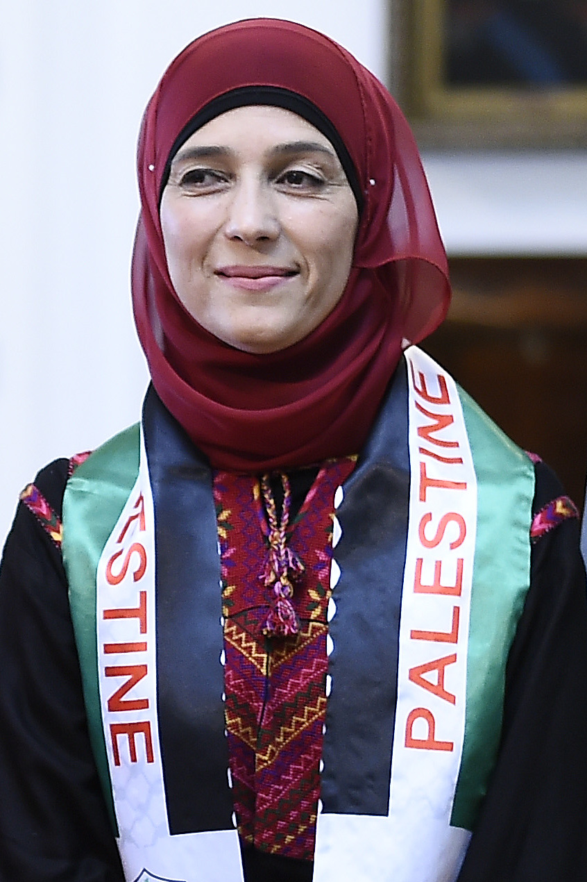 Gobierno de Chile